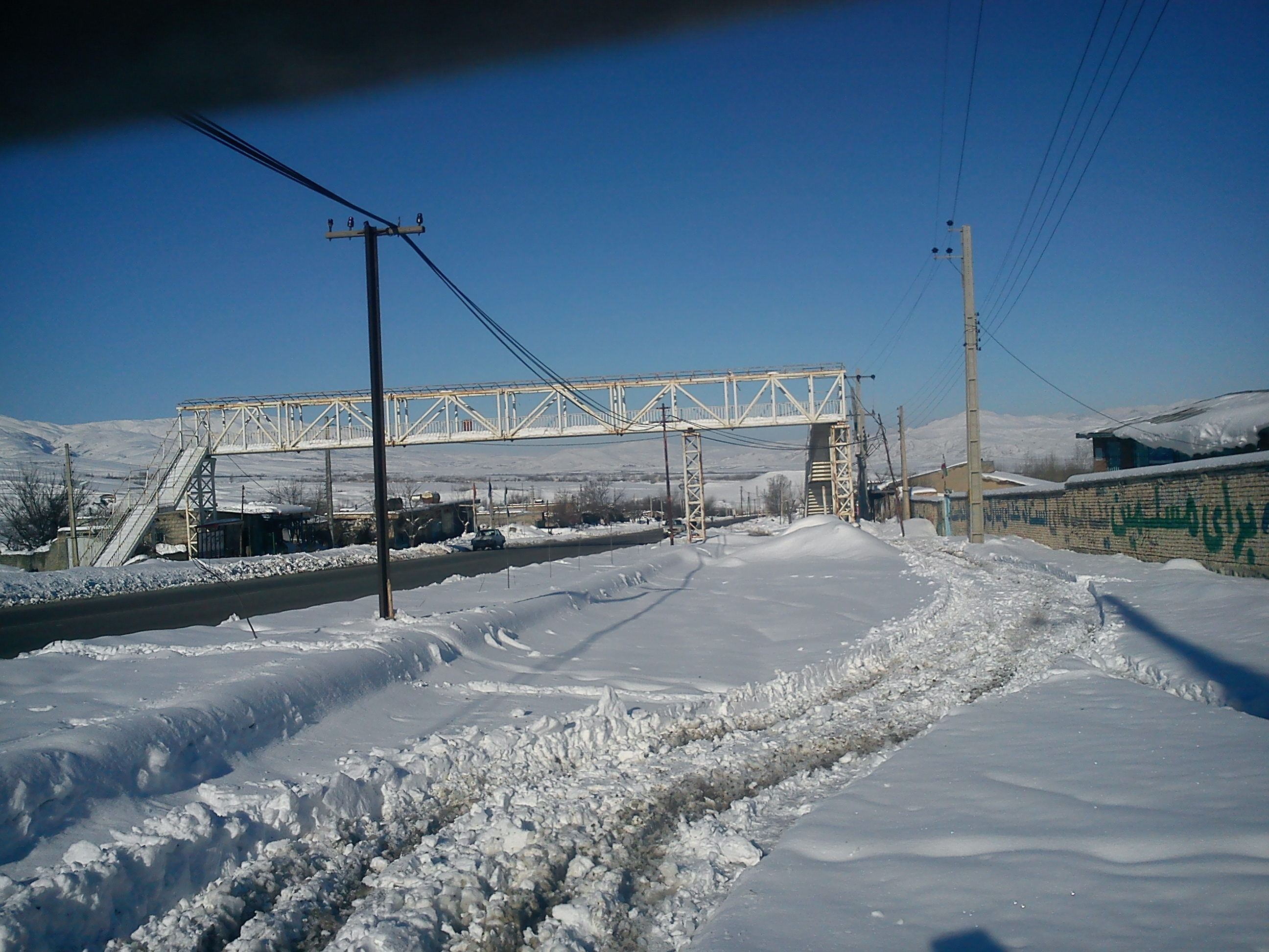 زمستان 2